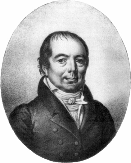 Joh. Gottfr. Bremser, Doctor der Arzeneykunde